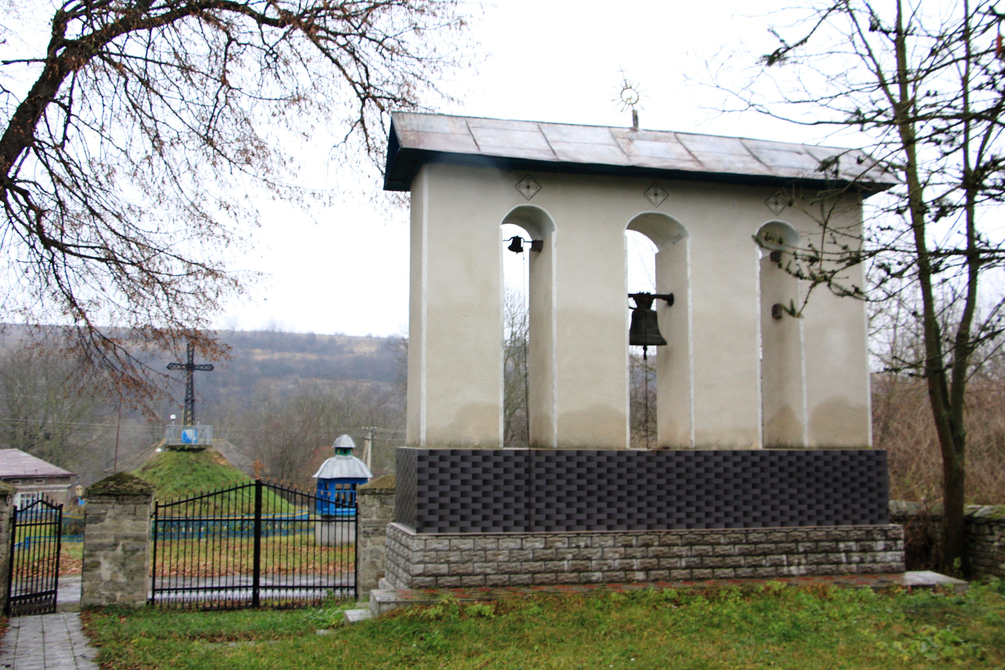 Церква св. Івана Богослова 1725 (дзвіниця)